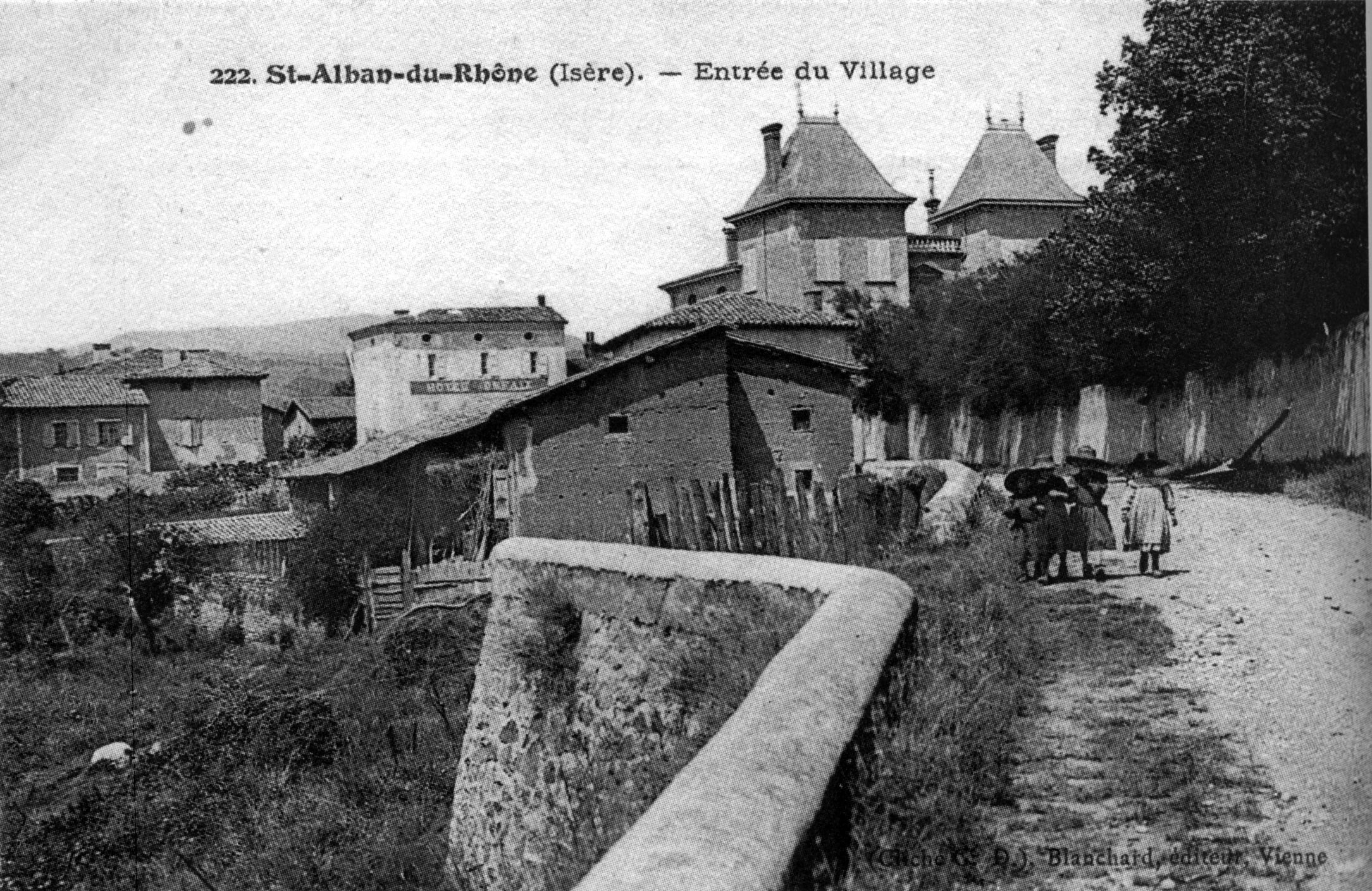 Saint-Alban-du-Rhone, entrée du village, 1910